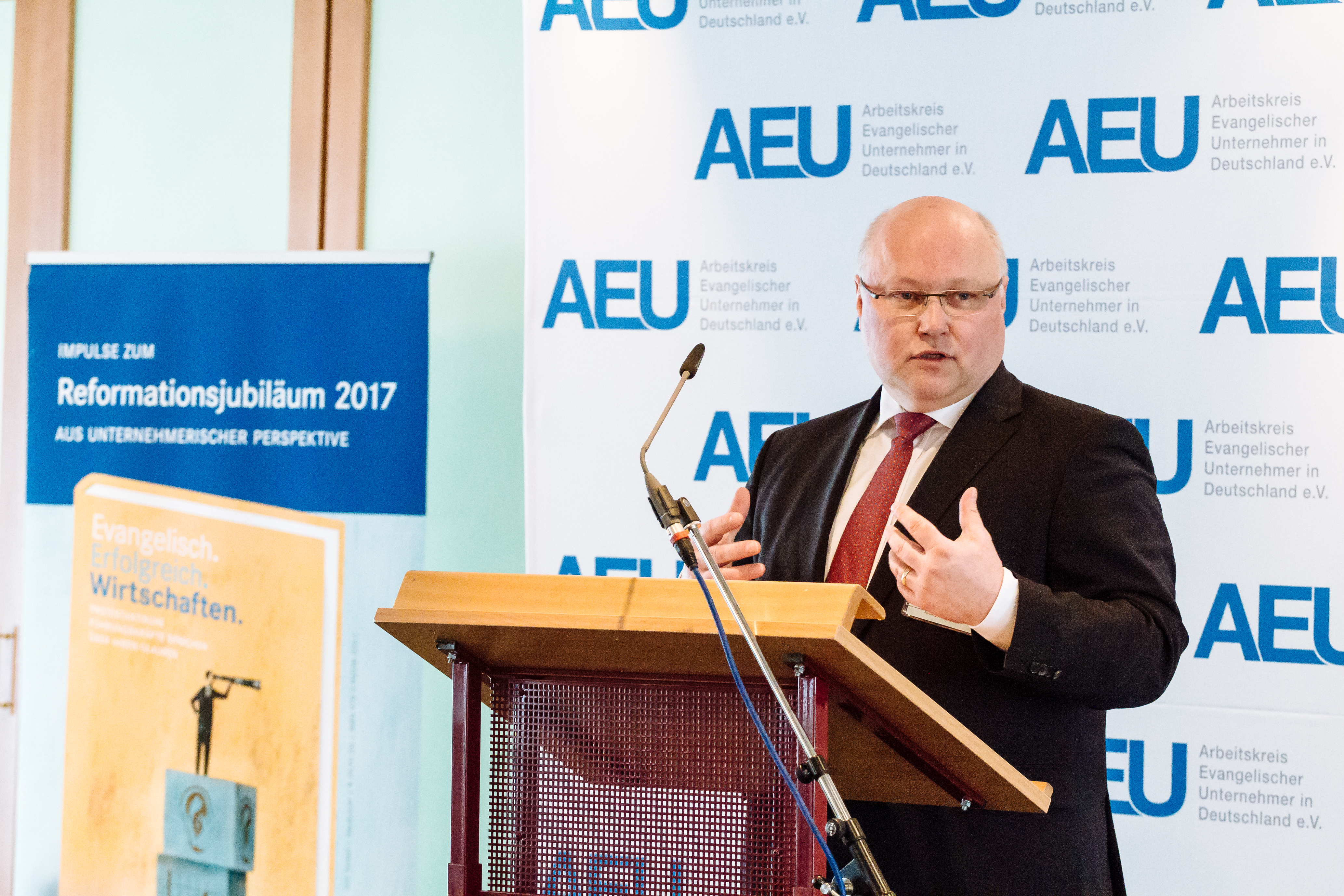 Das Bild zeigt Friedhelm Wachs, den stellvertrenden Vorsitzenden des Arbeitsrkeises Evangelischer Unternehmer (AEU) bei einem Podium zum Reformationsjahr 2017 in Eisenach.